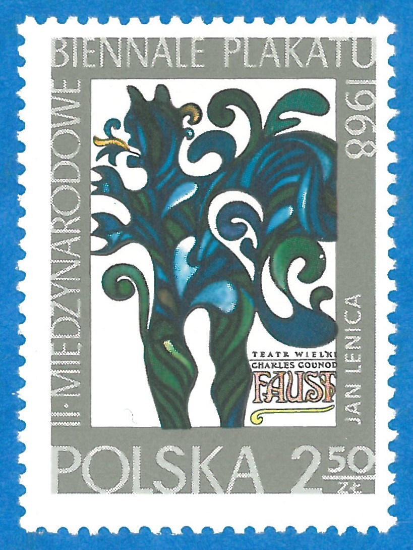 Gedenkbriefmarke der Polnischen Post anlässlich der II. Internationalen Plakatbiennale in Warschau 1968; Motiv: Plakat von Jan Lenica